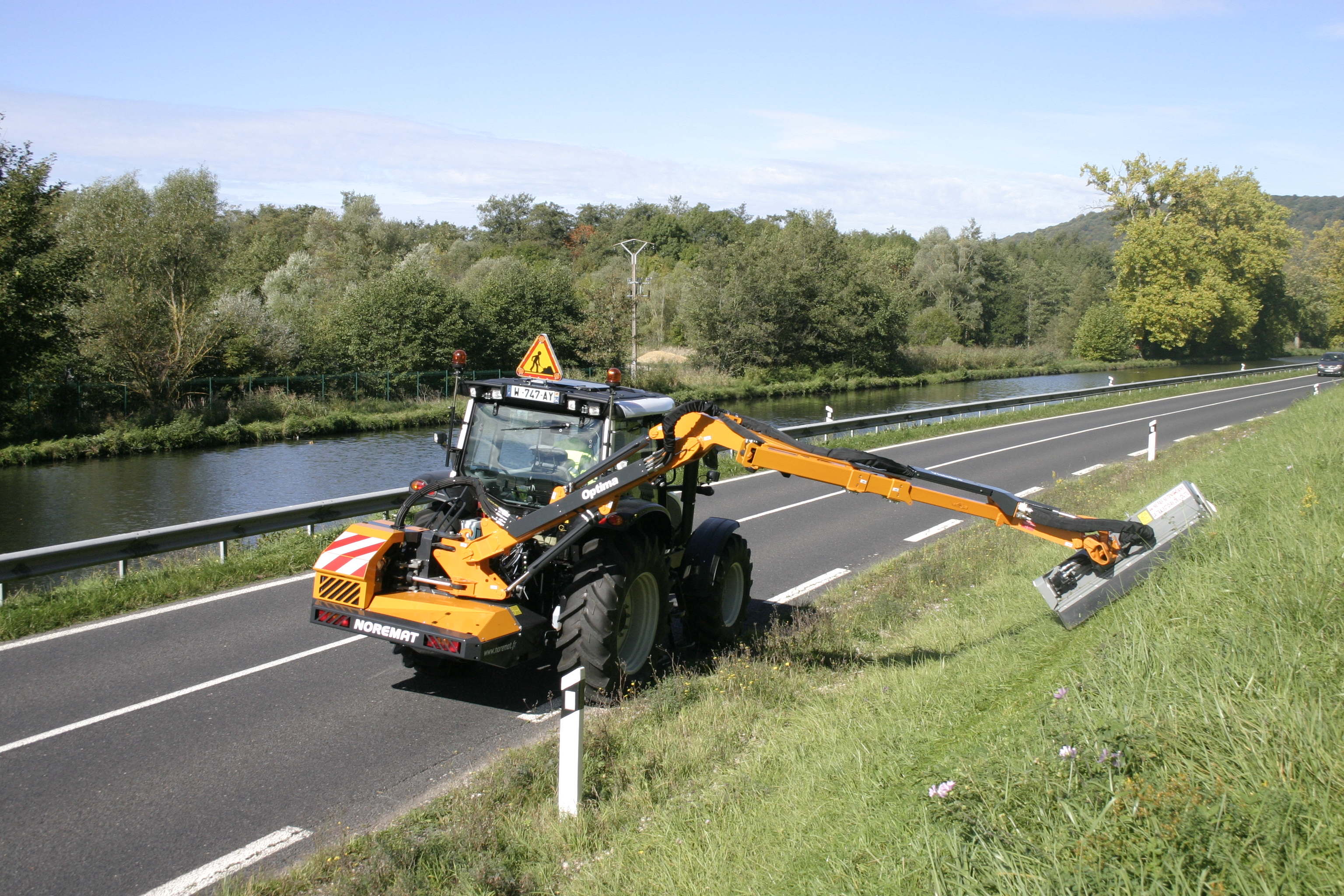 Épareuse